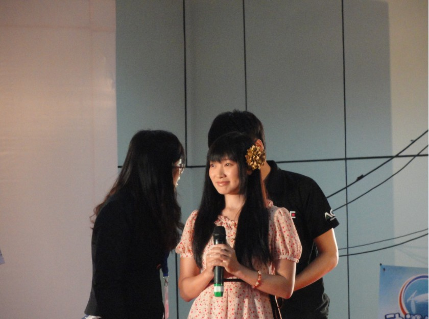 中文（中国大陆）: 福井裕佳梨在福州ACE